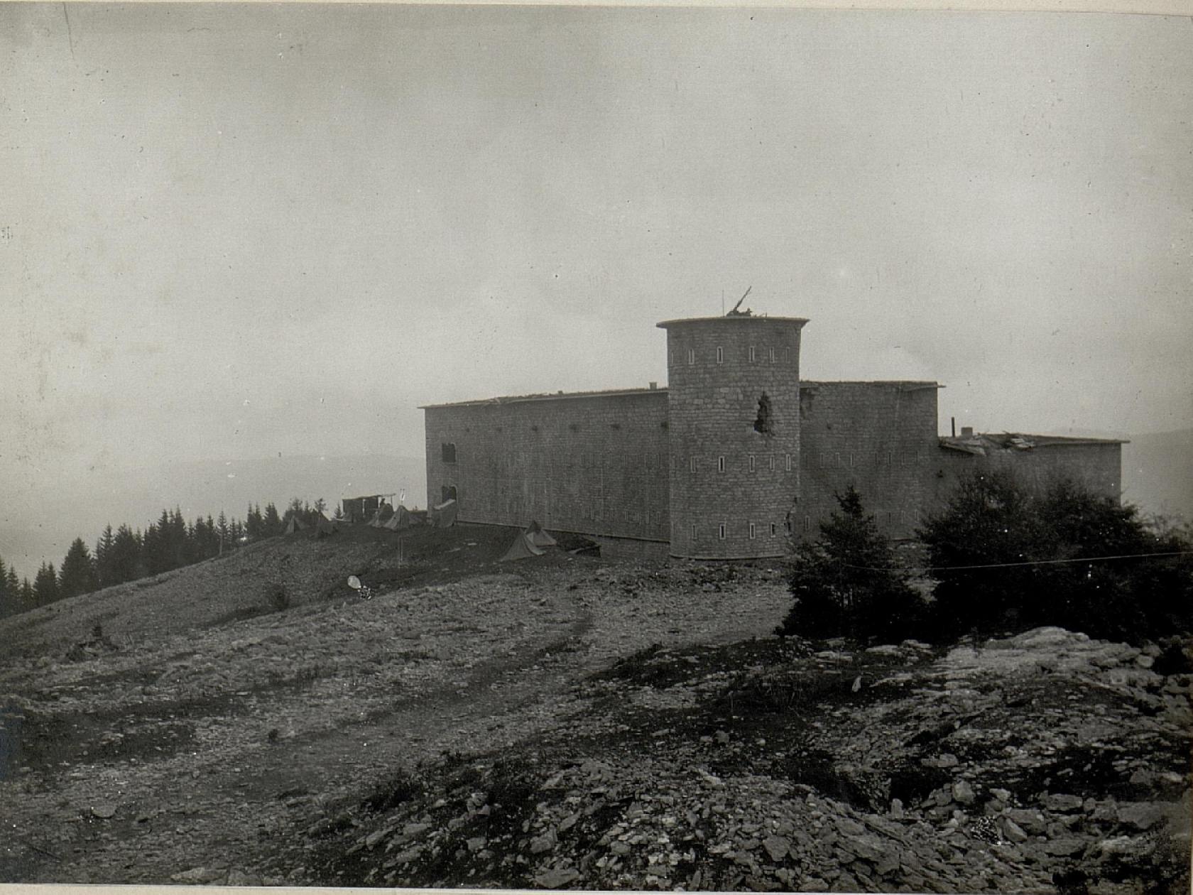 Devensic Kaserne in Interotto. Aufgenommen am 5. Juni 1916.